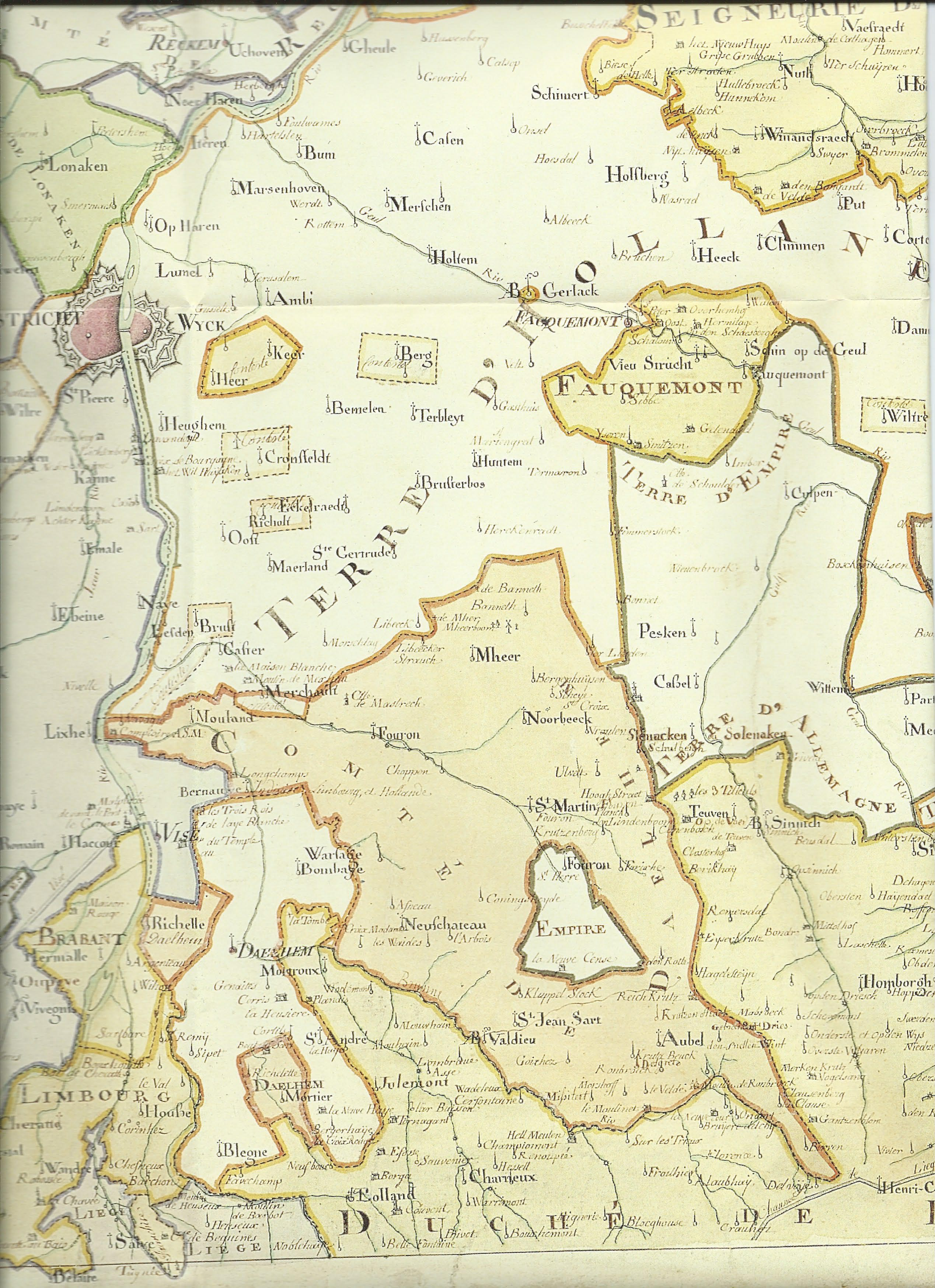 Het grensgebied langs de Maas op het einde van de 18de eeuw. Gereviseerde versie van de Ferraris kaarten met juistere grenzen.